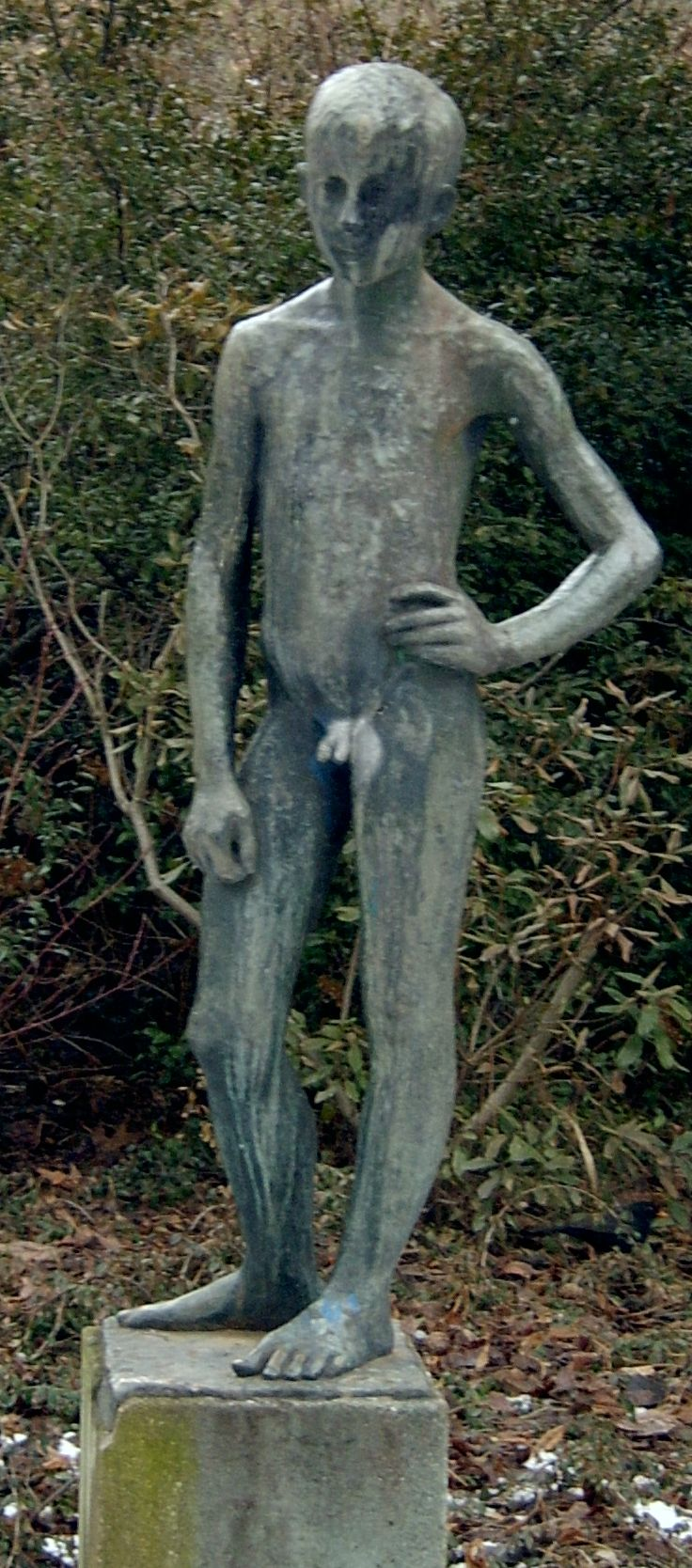 Nackter Junge von Wilfried Fitzenreiter im Lennépark in Frankfurt (Oder).